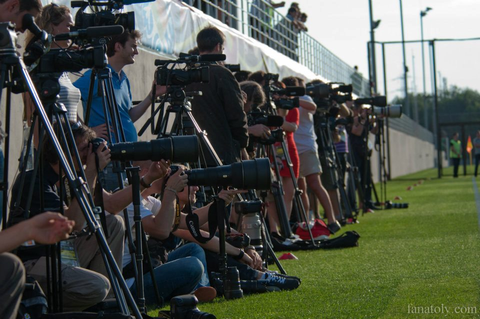 На тренировке сб. Франции по футболу. Чемпионат Евро-2012 (Донецк).